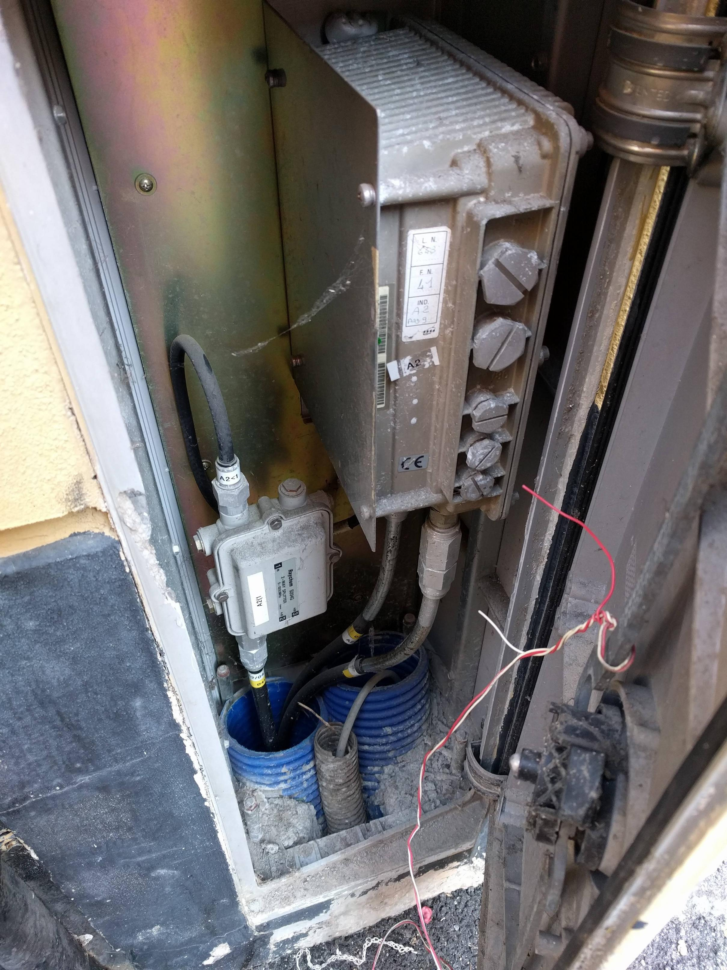 Apparati di rete del progetto SOCRATE